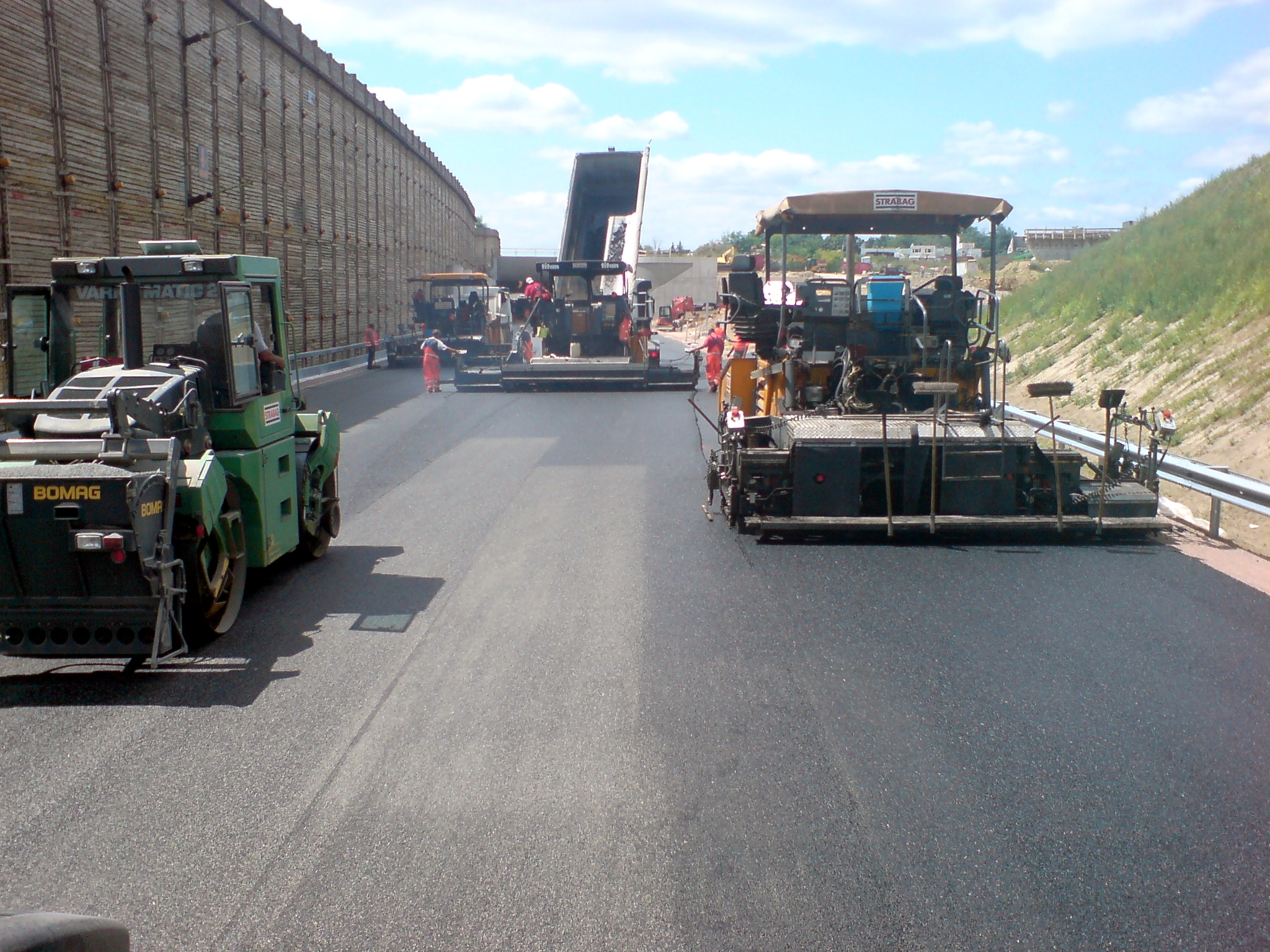 Asphaltfertiger der Strabag AG beim Deckeneinbau am Mainzer Ring der Bundesautobahn 60 bei Mainz-Hechtsheim. Das Einbauverfahren der Decke ist heiß an heiß um Nähte zu vermeiden.